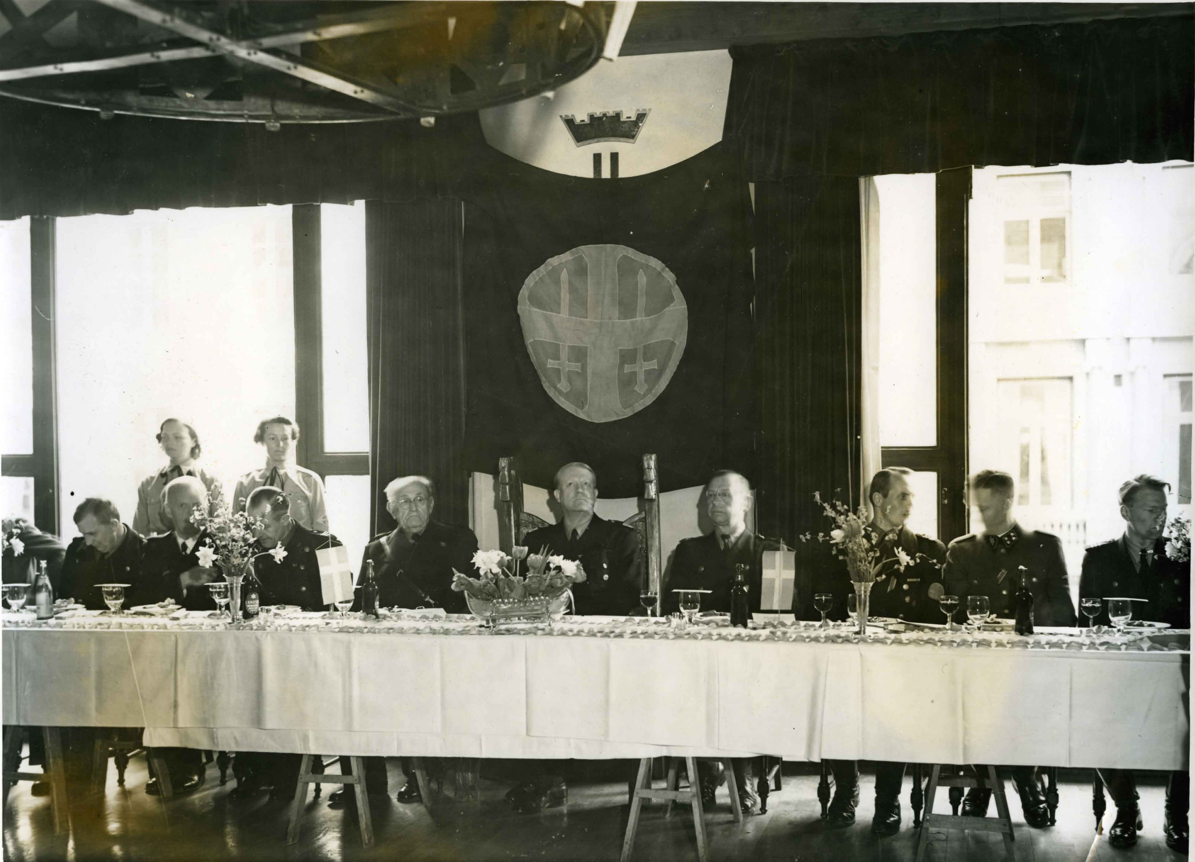 Ukjent datering. RA/PA-0781/Fd/0004/0668 1191